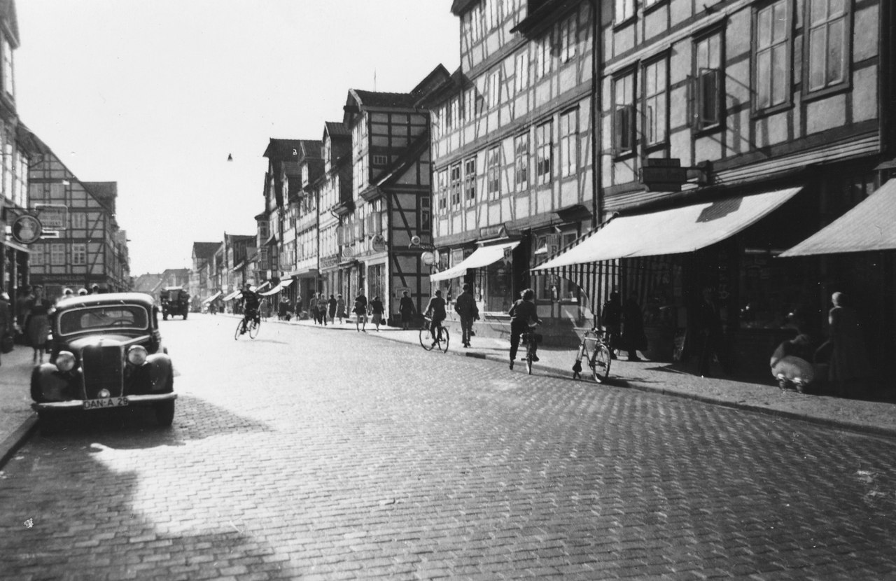 Lüchow Anno 1956Bergstraße in Lüchow im August 1956. Aufnahme auf Rollfilm mit einer Box Agfa Clack.